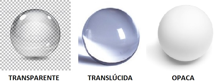 exemplos de meios opticos